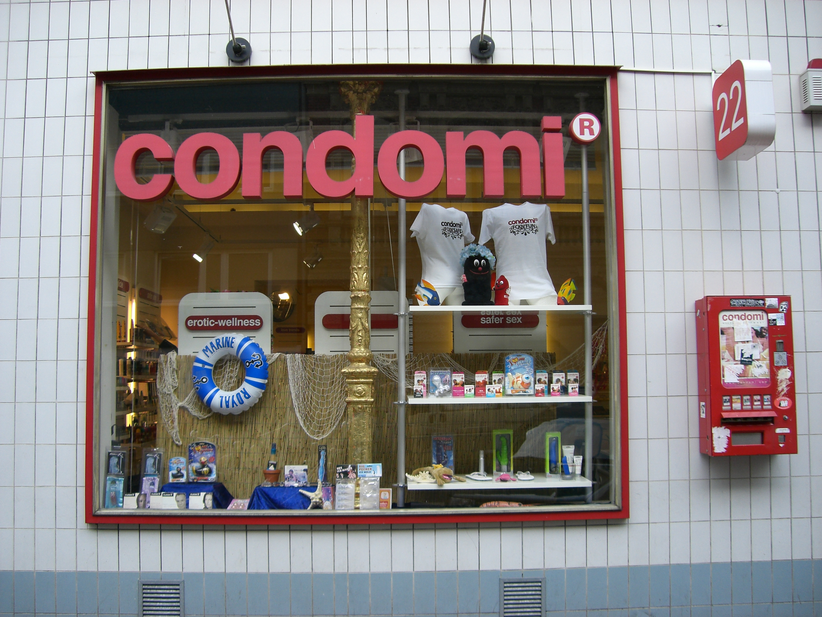 Schaufenster des Condomi-Ladengeschäftes in Köln